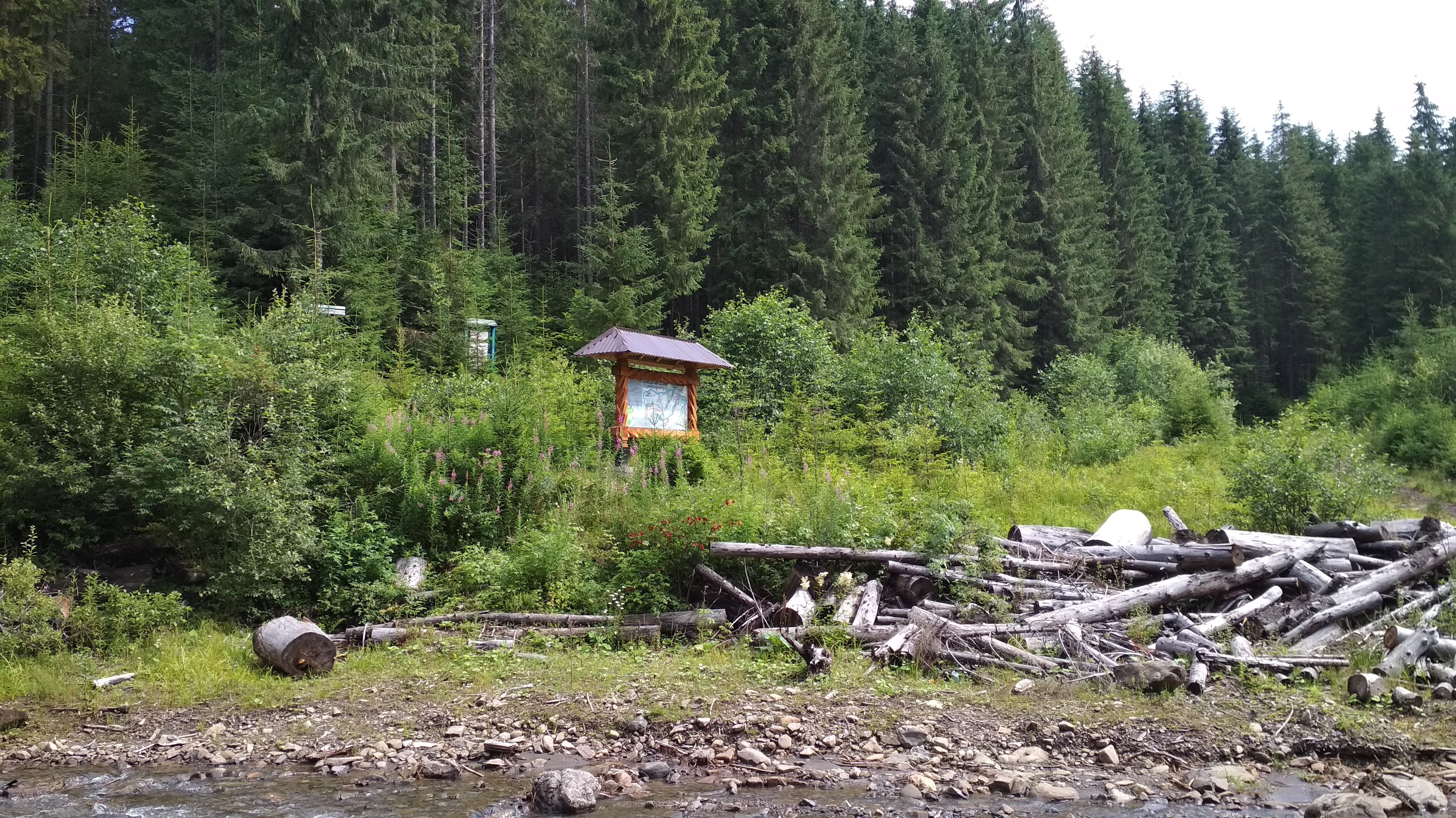 Інформаційно-охоронний стенд заказника